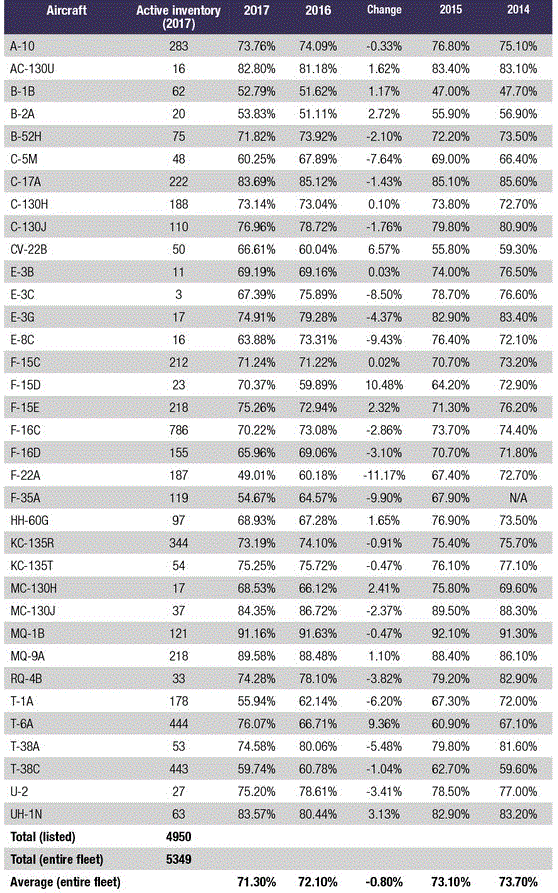 Inventaire des aéronefs de l'USAF en 2017 et leurs taux de disponibilité.